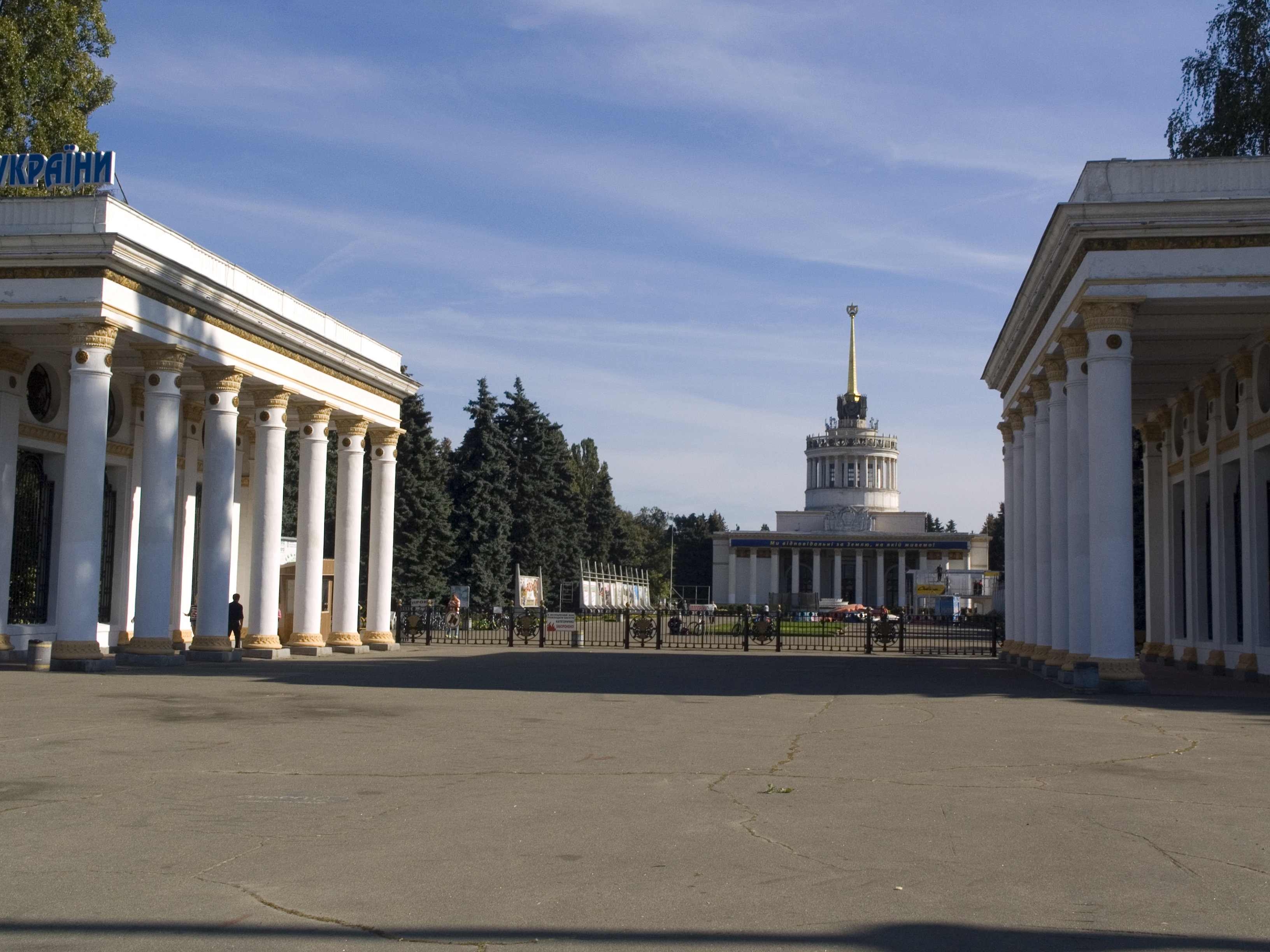 Україна, Київ - Виставка досягнень народного господарства УРСР - Головний вхід